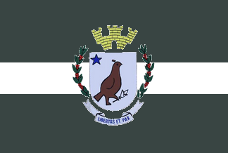 Bandeira de Uru - SP - Brasil.